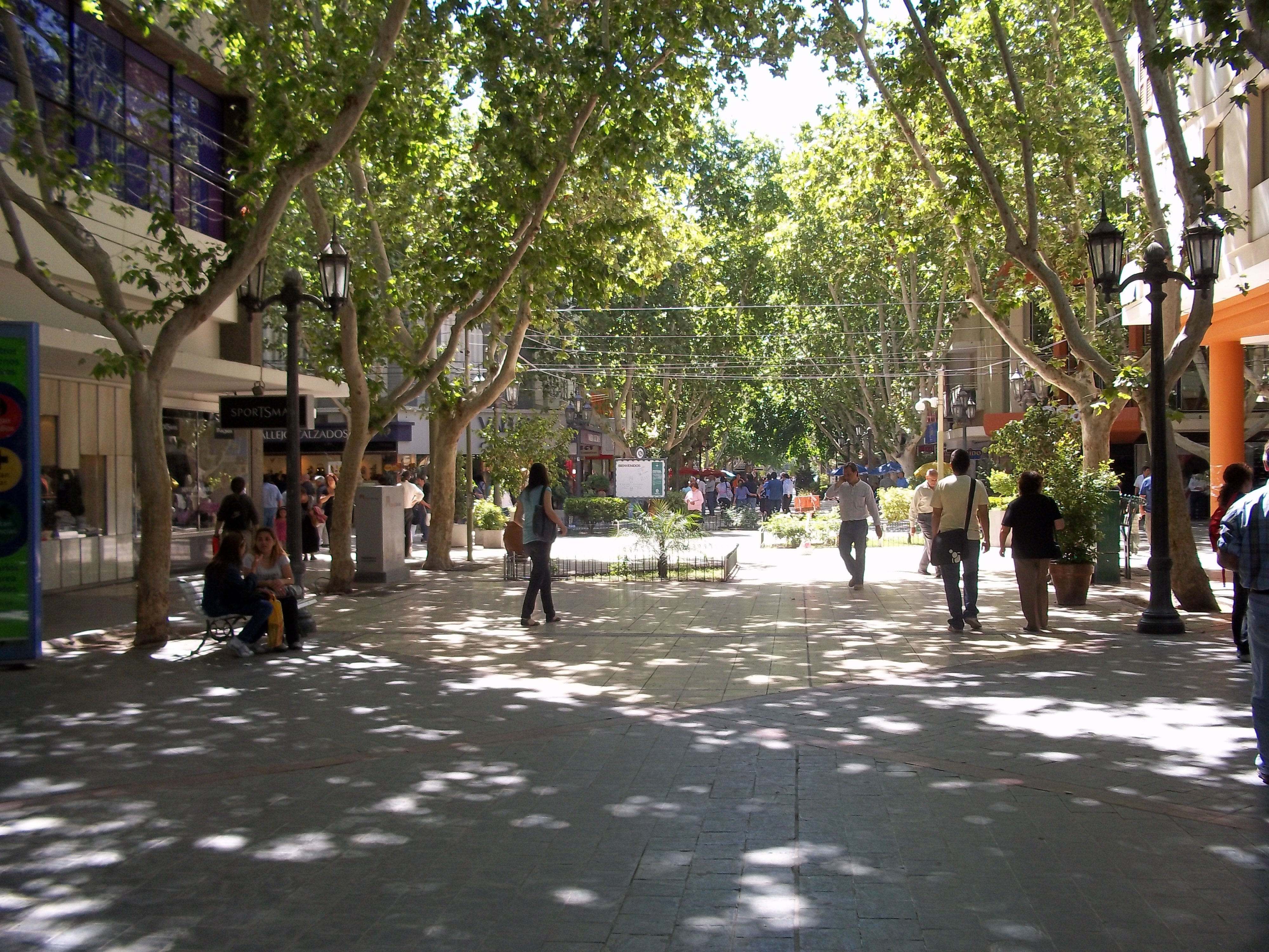 Fotografía que ilustra la Peatonal Rivadavia del centro de la Ciudad de San Juan, Argentina